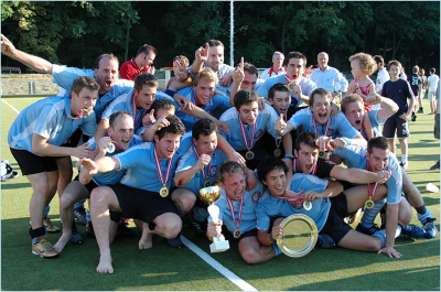 Herrenmannschaft beim Sieg des Meistertitels 2007